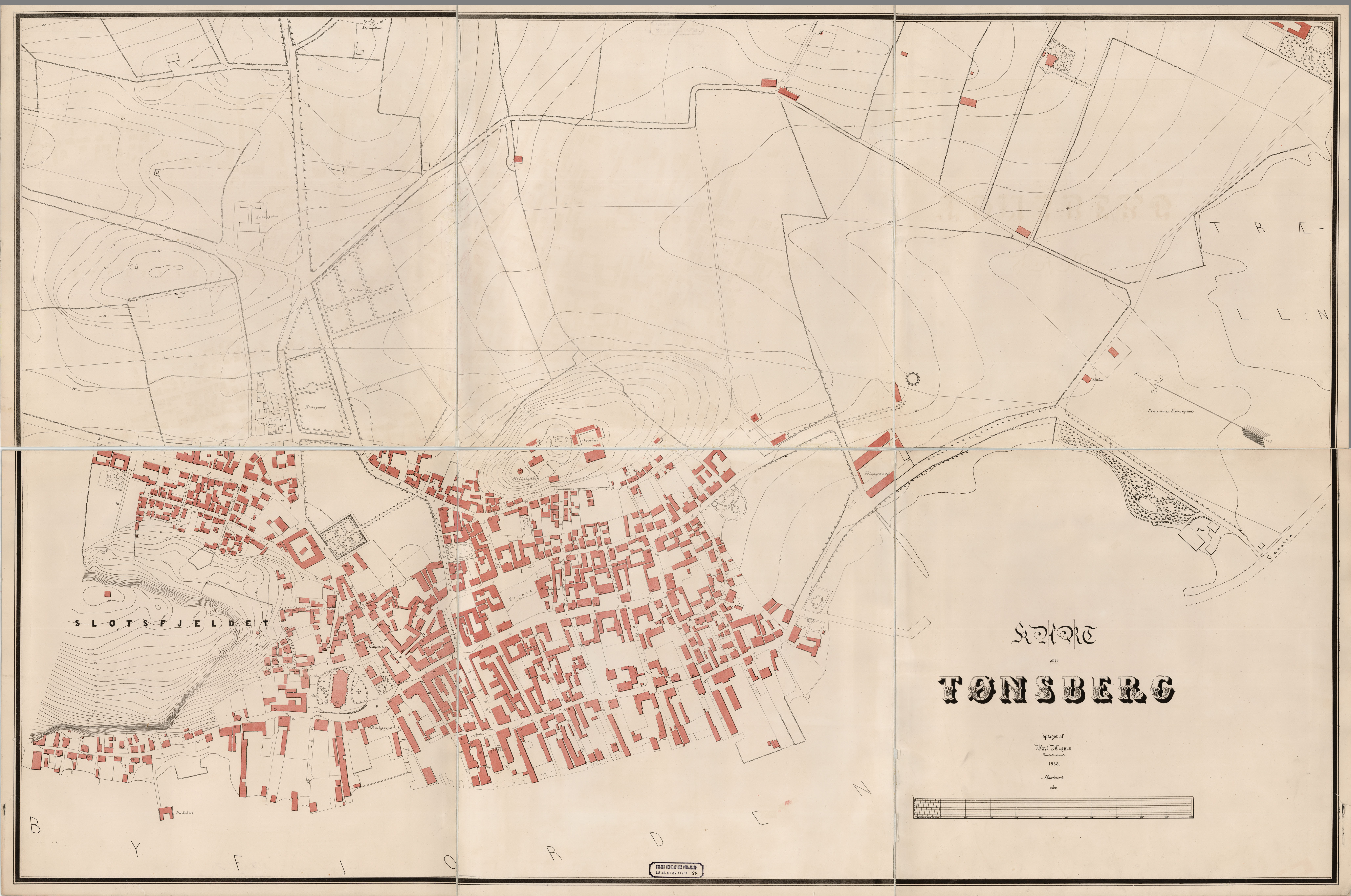 Kart over Tønsberg